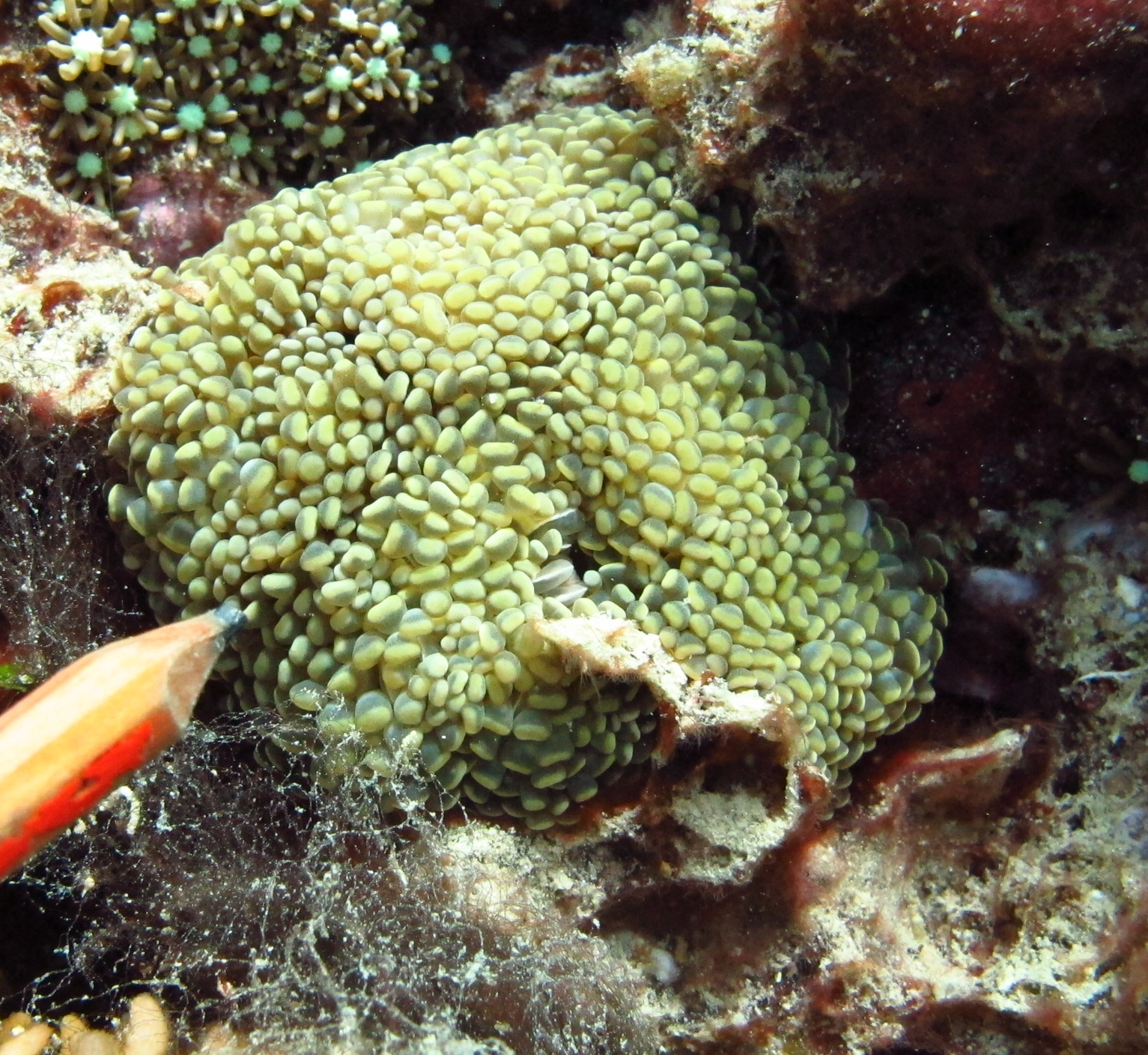 Euphyllia cristata en isla Mer, Estrecho de Torres, Australia